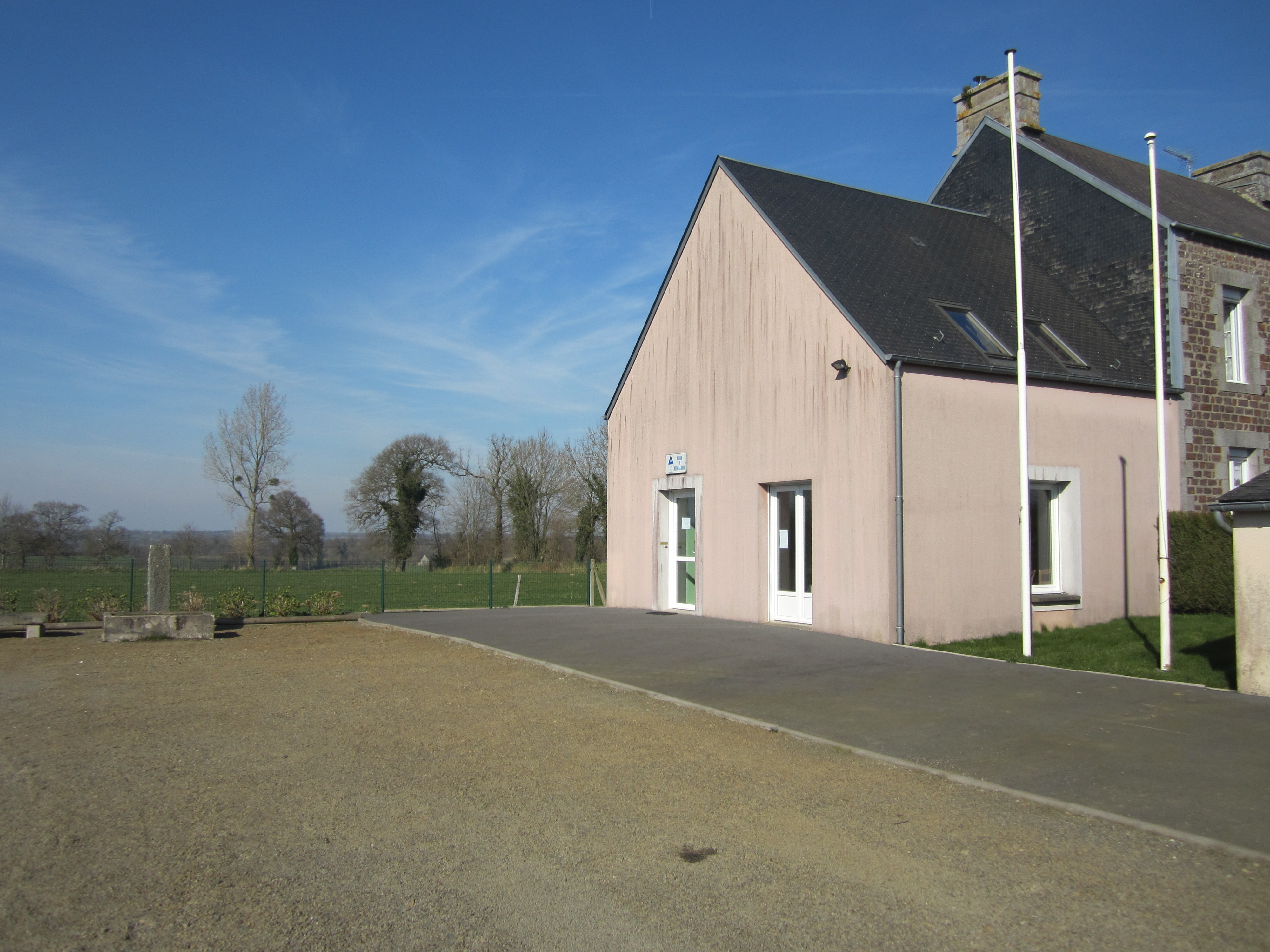 Le Mesnil-Amand, Manche